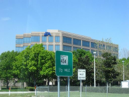 Hauptquartier von EA Tiburon